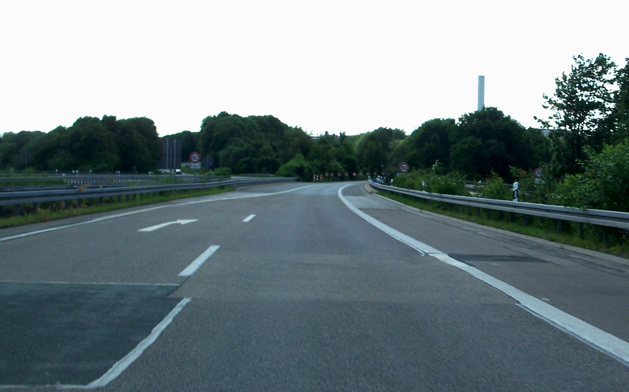 Das Ausbauende der Bundesautobahn 44 in Bochum